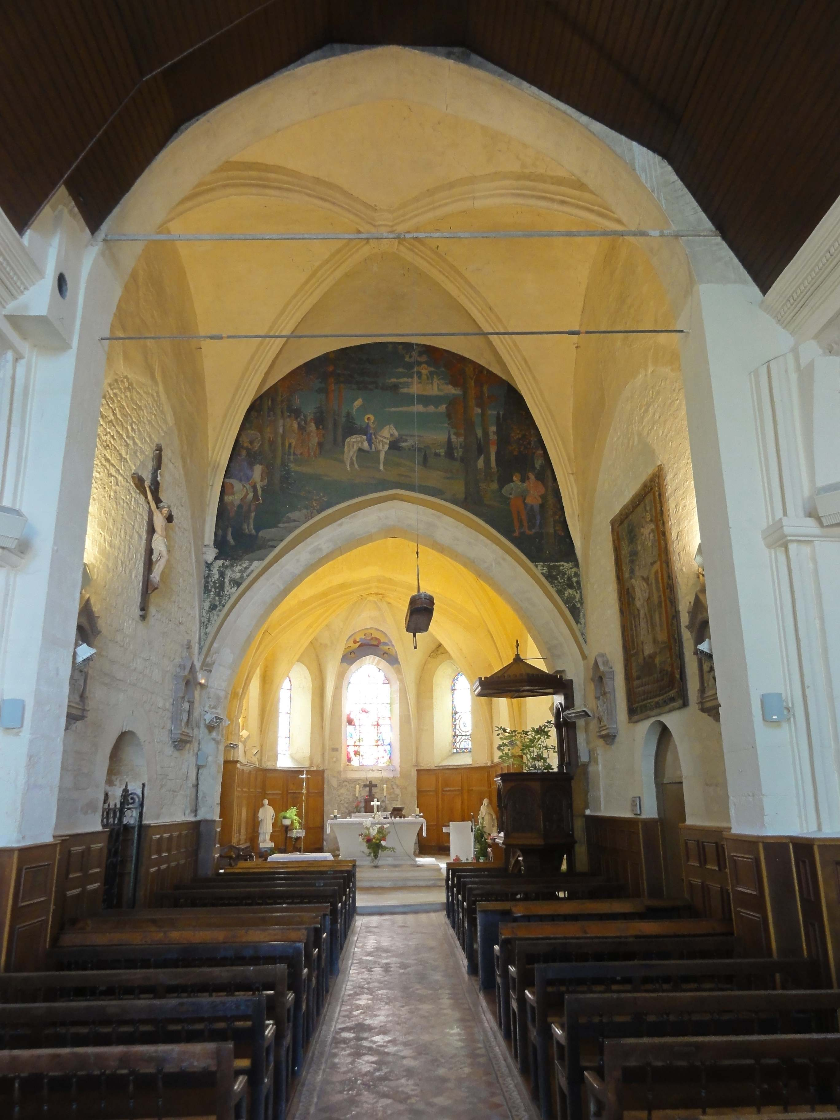 Intérieur de l'église (voir titre).